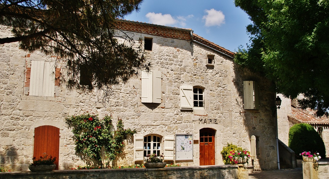 La Mairie